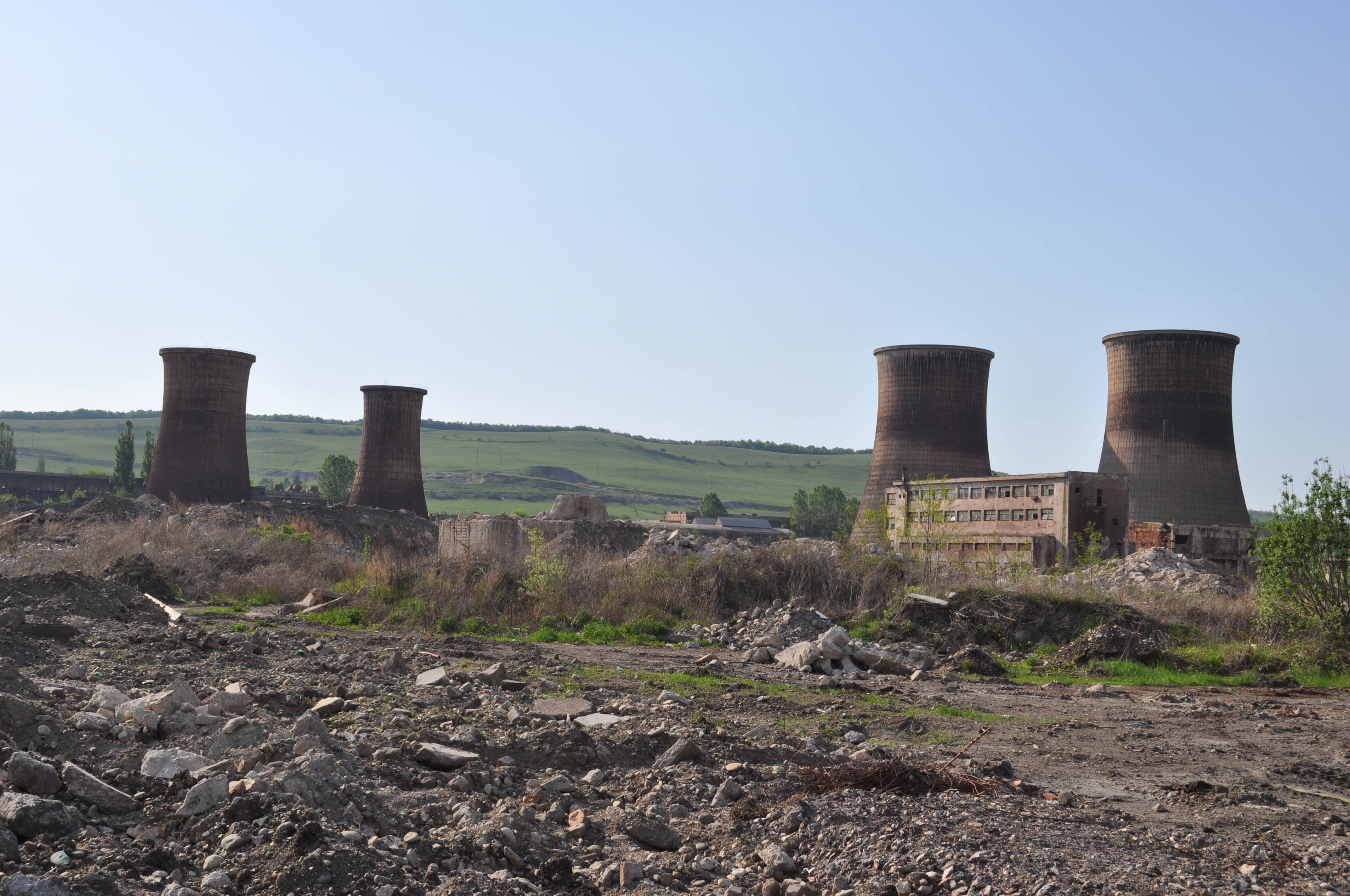 Uzina Călan